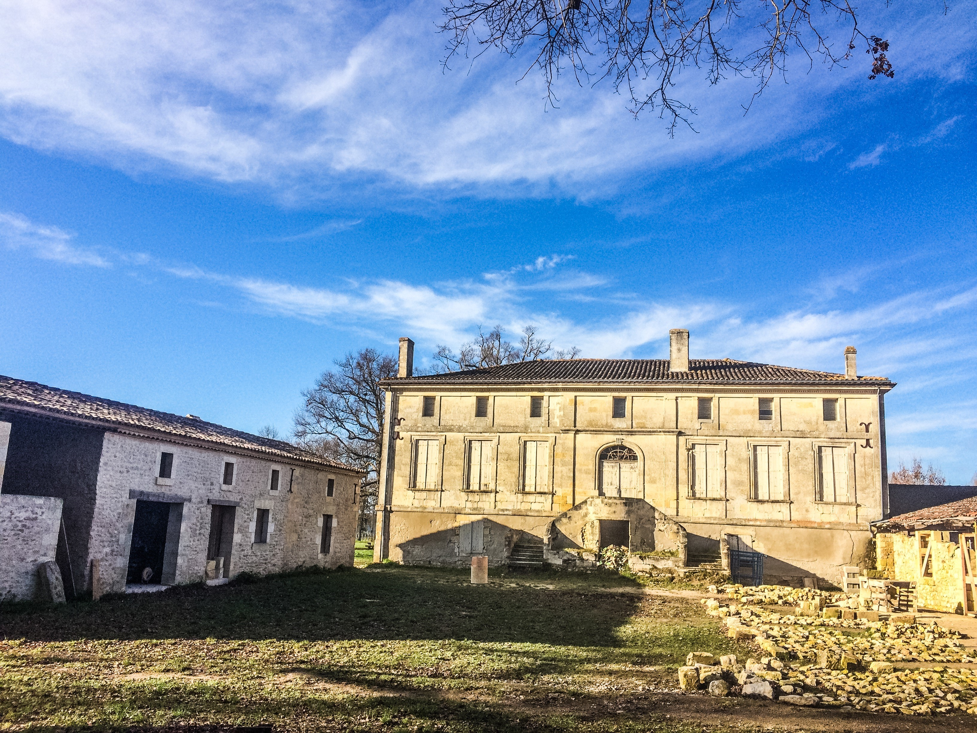 Domaine de La Paillerie, maison de maître du XVIIIe siècle à Braud-et-Saint-Louis (Gironde, France).